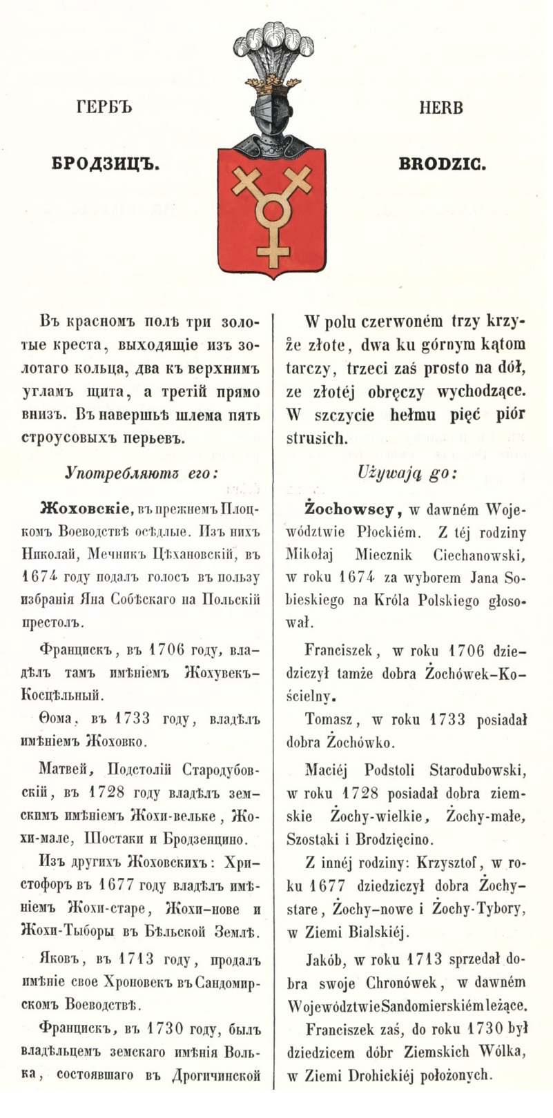 Przetworzone strony opisujące herb brodzic i klejnotnych